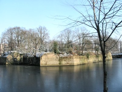 Bergen op Zoom, Ravelijn, januari 2004, eigen foto